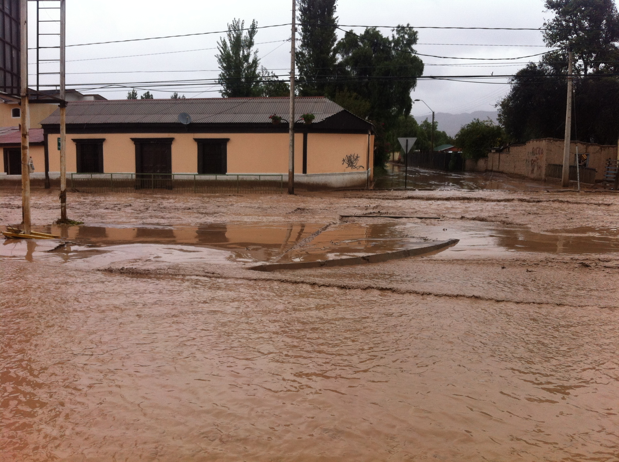 Inundaciones en Copiapo, Marzo 2015.